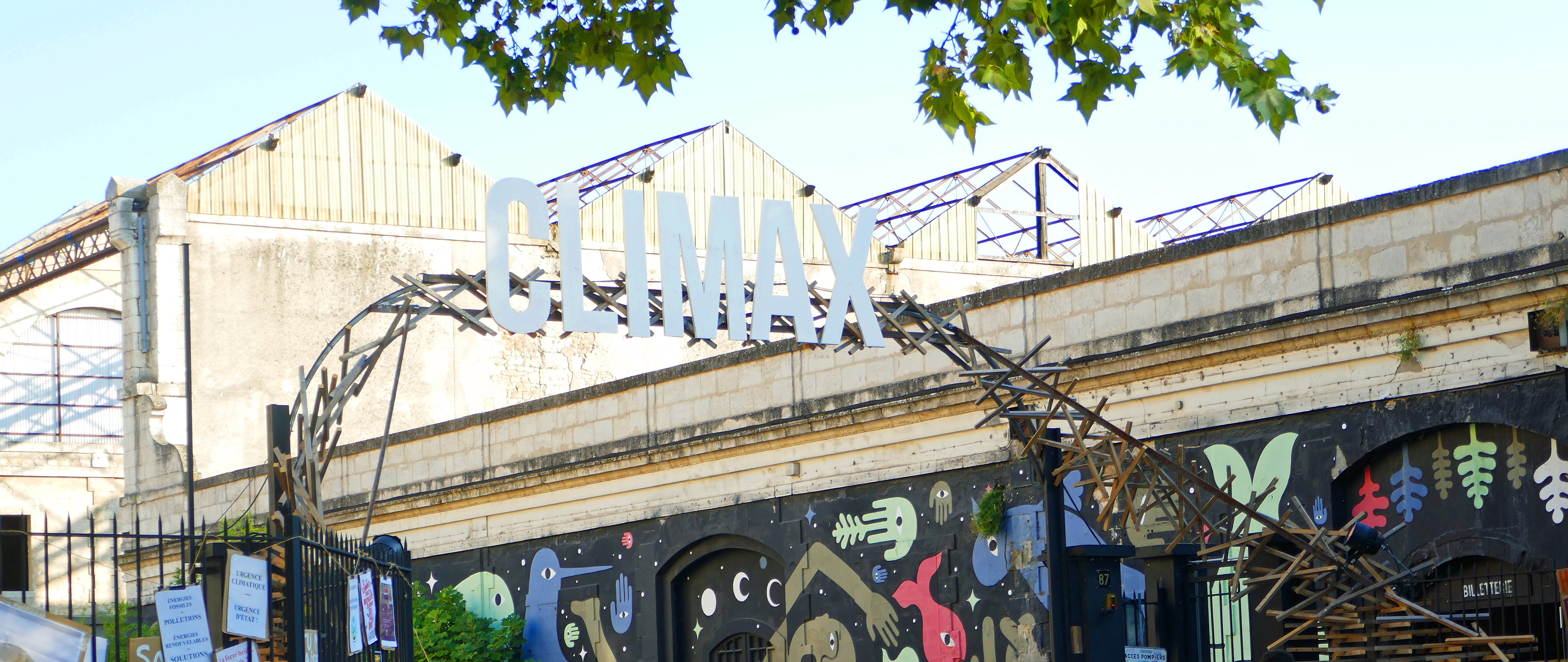 Écoquartier Darwin à Bordeaux : festival Climax 2018.